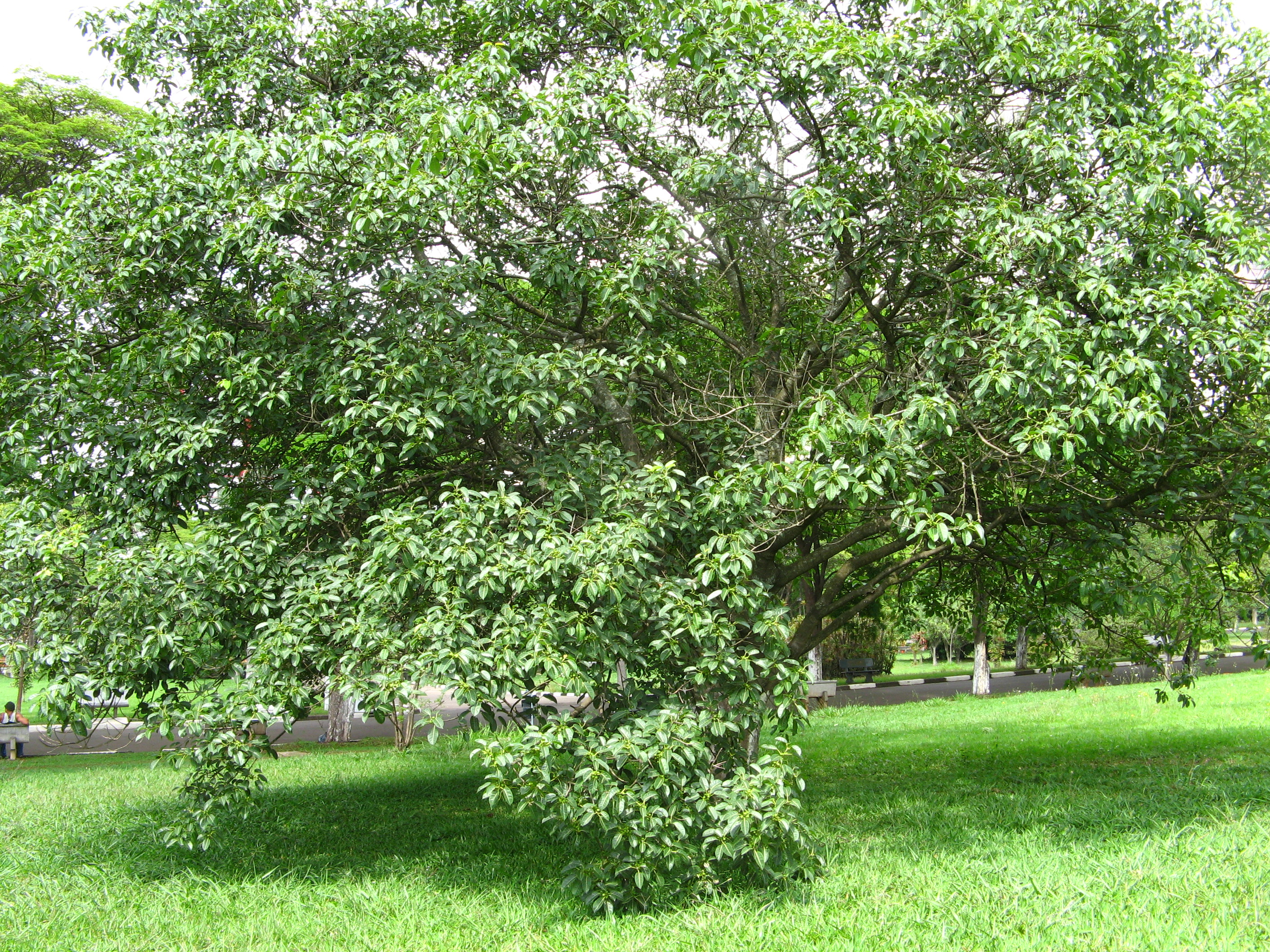 Ficuscitrifolia inteiro sao paulo